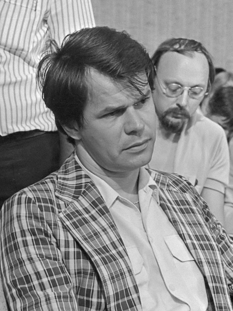 Uitspraak in het kort geding van dhr. Herrenberg versus Het Parool over een artikel betreffende zijn vermeende rol in de cocaine-dollaraffaire. Hoofdredacteur Wouter Gortzak (l) en journalist Paul Grijpma van Het Parool 25 juli 1983